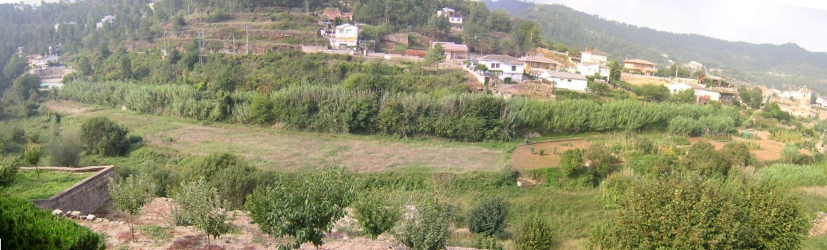 La Feixa Llarga (Monistrol de Calders, Moianès)